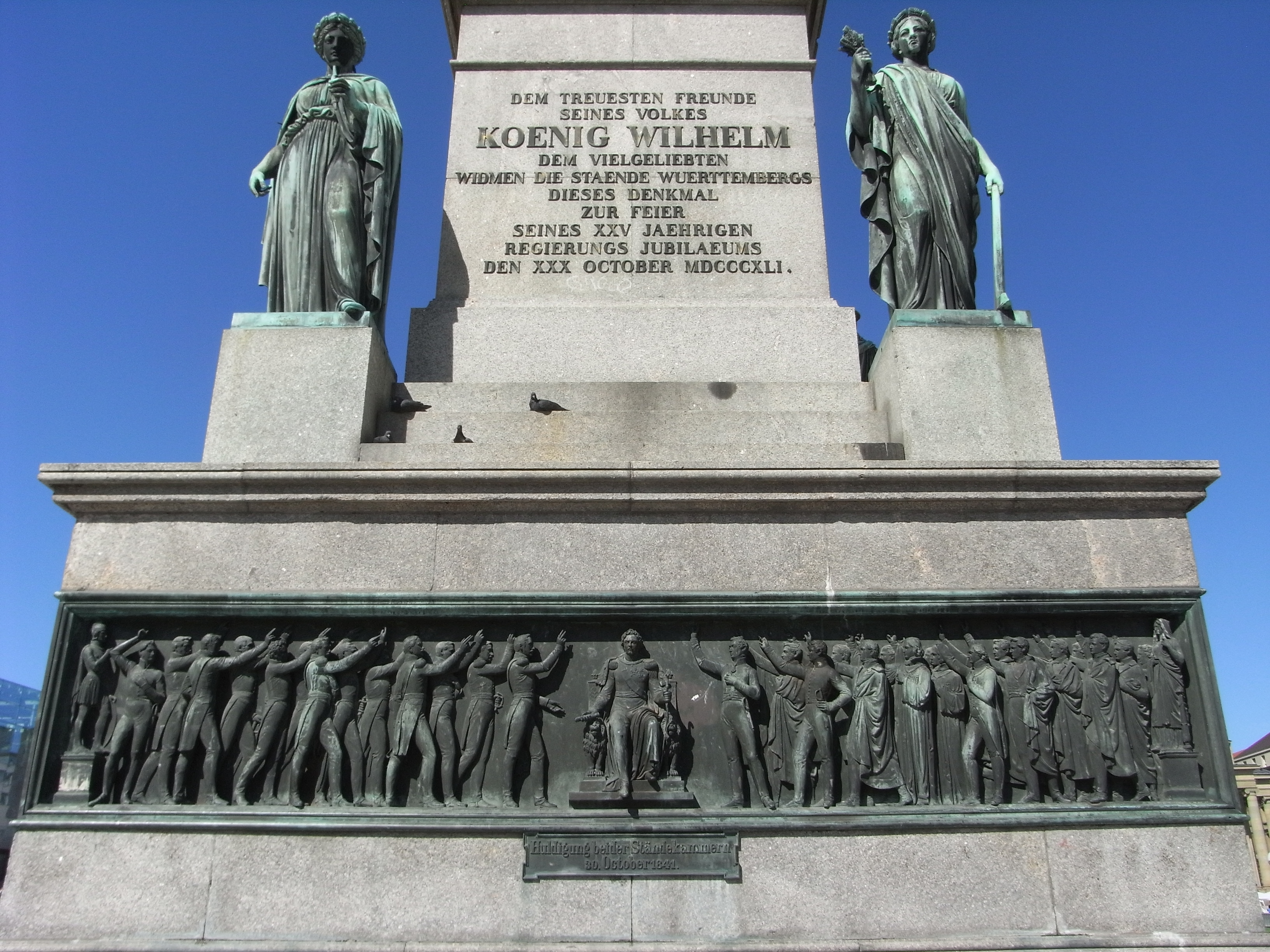 Stuttgart, Schlossplatz, Flst. (Flurstück) Nr. 660/1, Jubiläumssäule, 1842-1846.